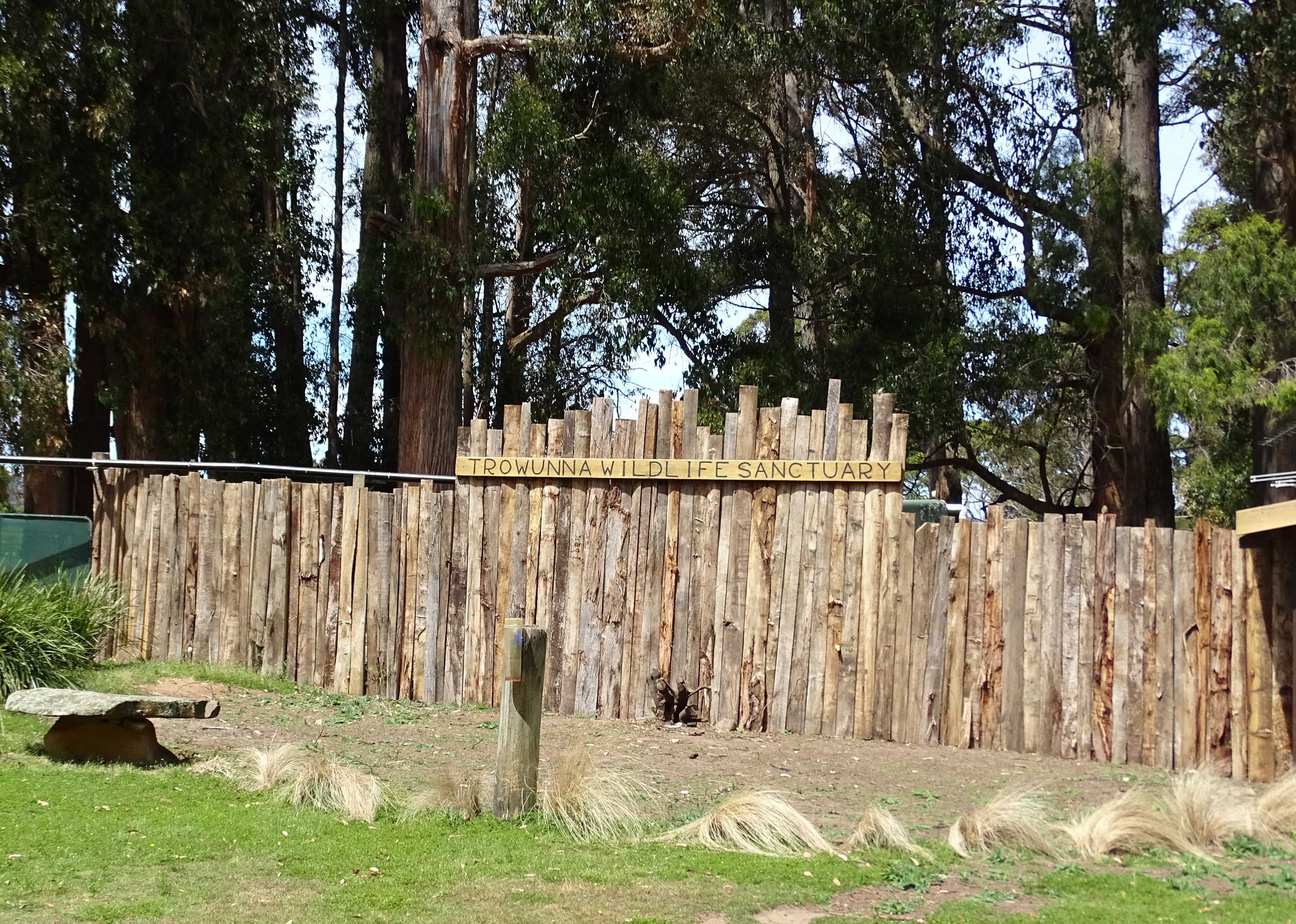 Trowunna Wildlife Park (mit großer Zucht der "tasmanischen Teufel"), in der Nähe von Mole Creek, Tasmanien, Australien